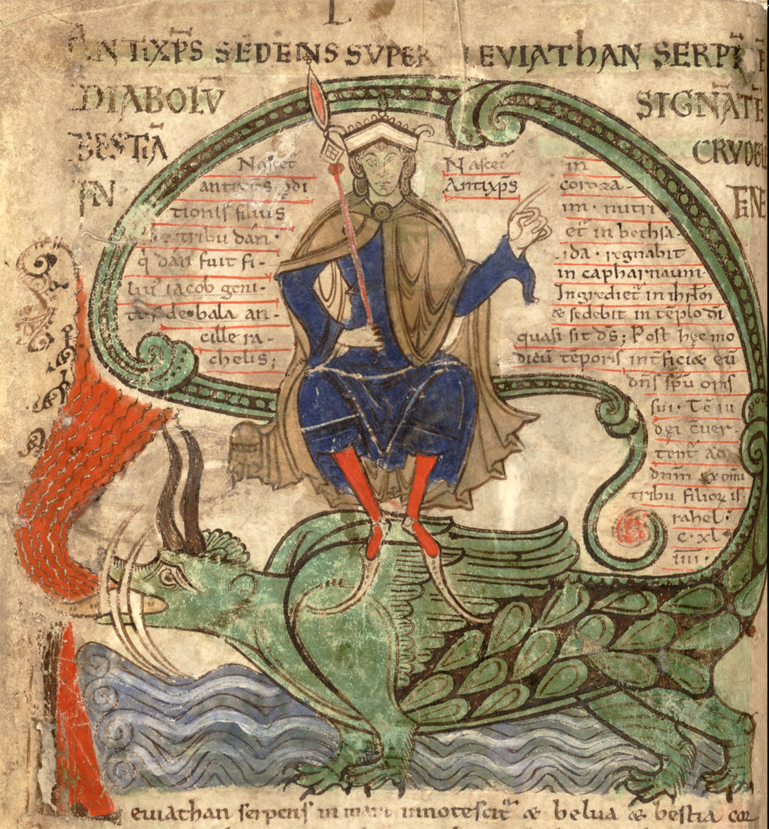 Antéchrist assis sur le Léviathan. Liber Floridus (Ghent University) 1120. (Google Books)